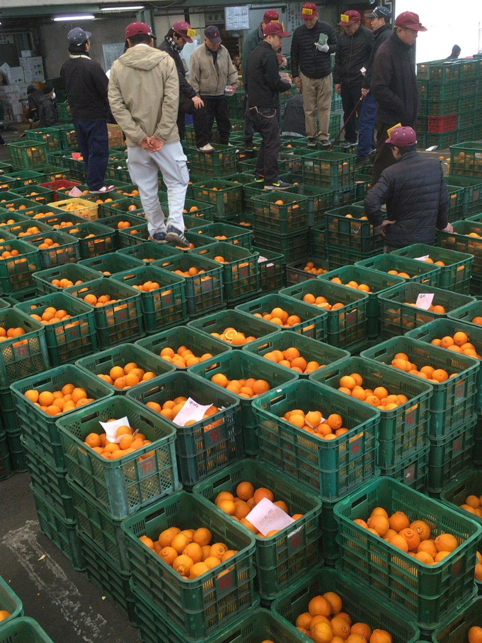 柑橘の町 八幡浜を一瞬で納得させる、八幡浜でしか見られない風景。初見の人はその柑橘の物量に圧倒されること間違いなし。青果のセリを見るなら北の青森弘前(りんご)、南の愛媛八幡浜(みかん)と業界では有名なセリの風景です。中でもカネカ市場は全国の青果市場の中で柑橘出荷量No.1です。シーズンになると全国のスーパーマーケットのバイヤーや市場関係者が見学にやって来ます。